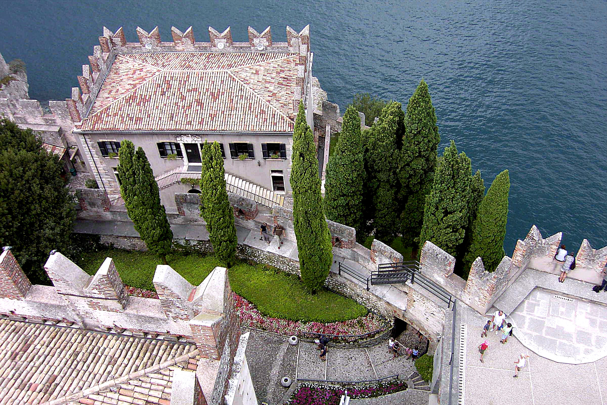 Dieses Bild zeigt eine Ansicht der Burg von Malcesine am Gardasee in Italien. Ich habe es am 4.September 2003 gemacht.